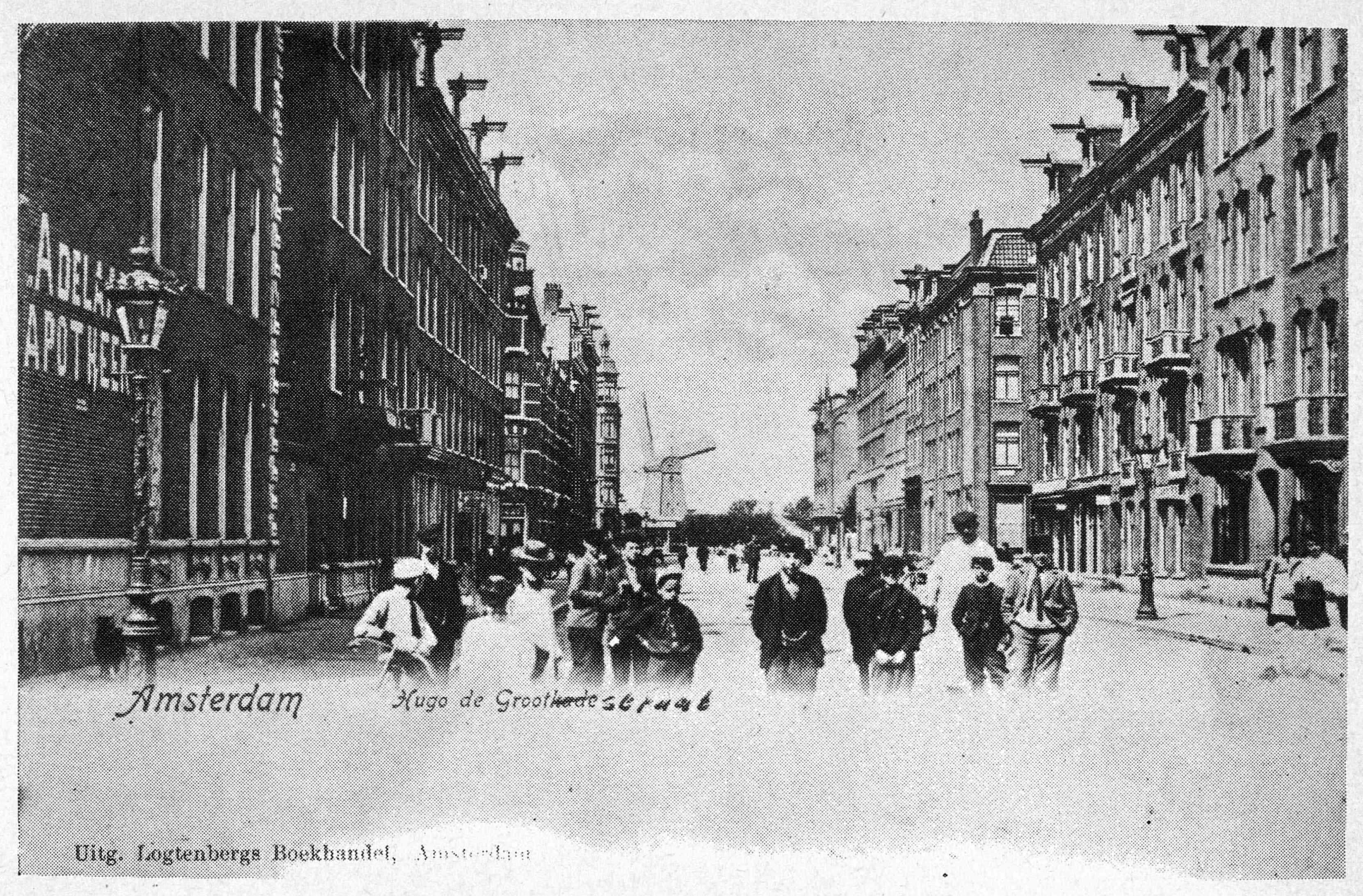 Photographed in Amsterdam between 1900 and 1914.